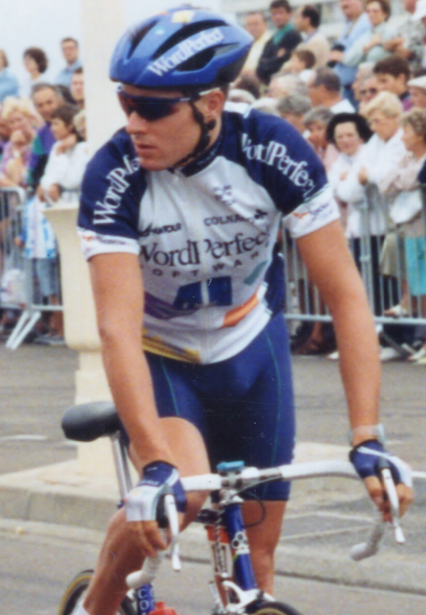 Dieter Runkel, ciclista suís